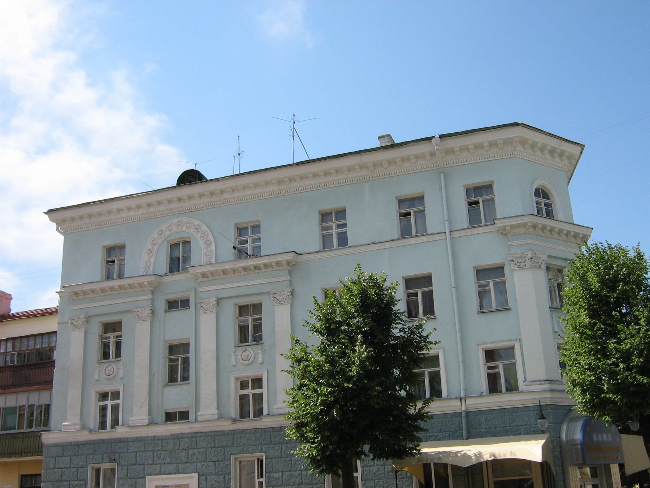 Могилев. Р-н к-тра "Родина"